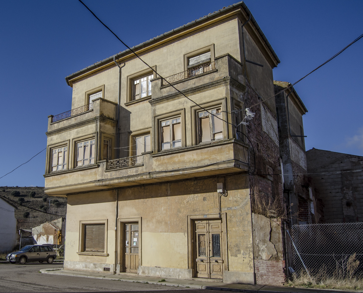 Alar del Rey. Caserón.